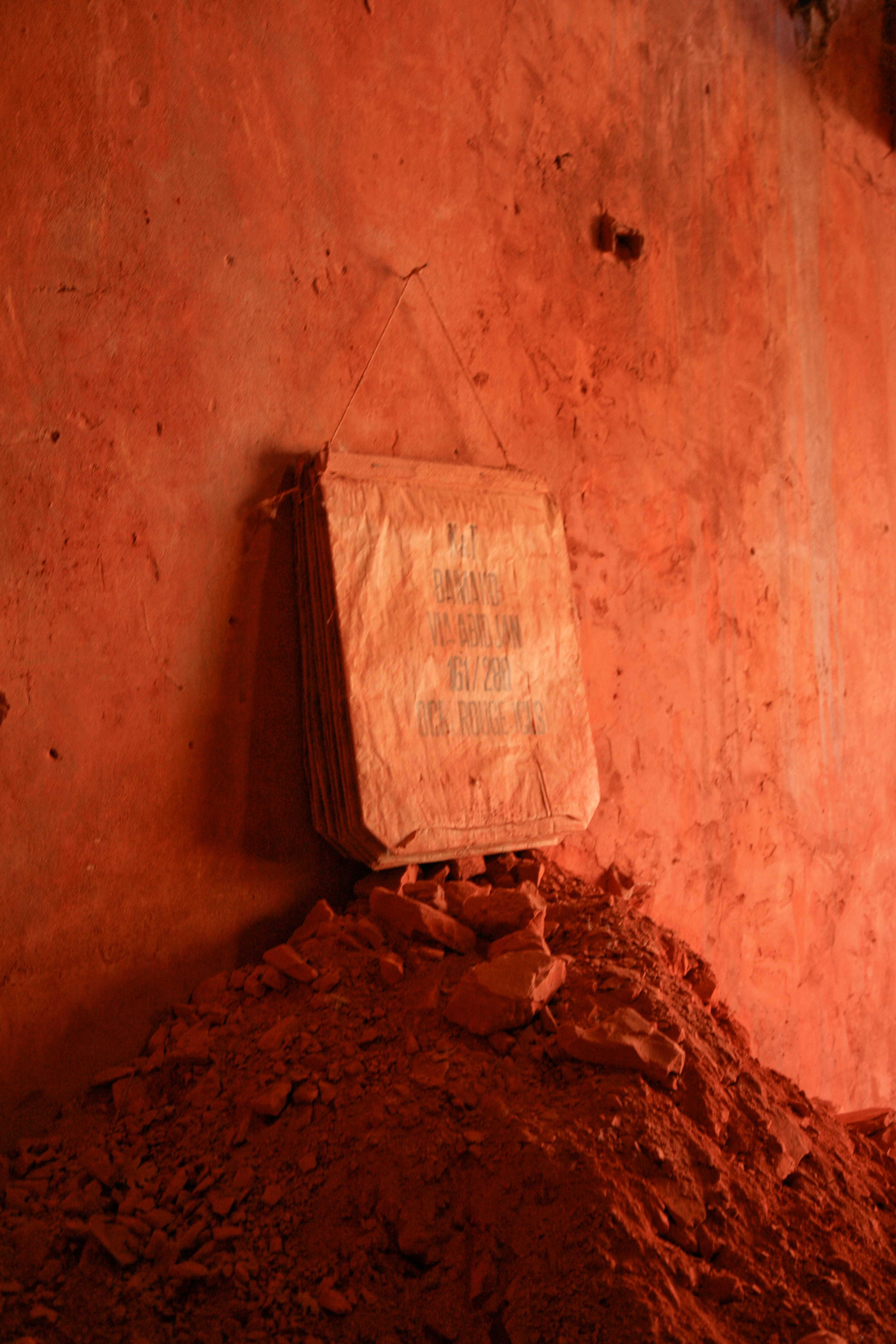 Stockage de l'ocre au Conservatoire des ocres de Roussillon